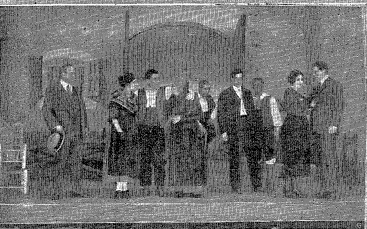 Madrid en el Teatro de la Princesa. Una escena de la nueva obra, de Rincón Lazcano, Espigas de un haz.